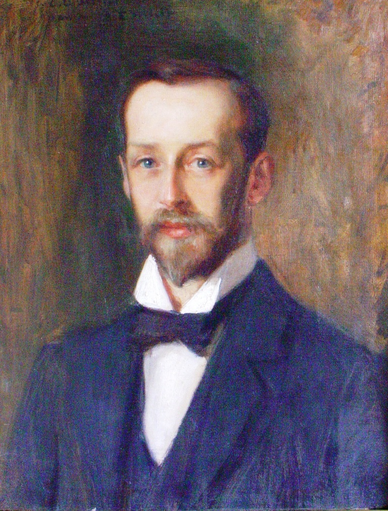 Визель, Эмиль Оскарович